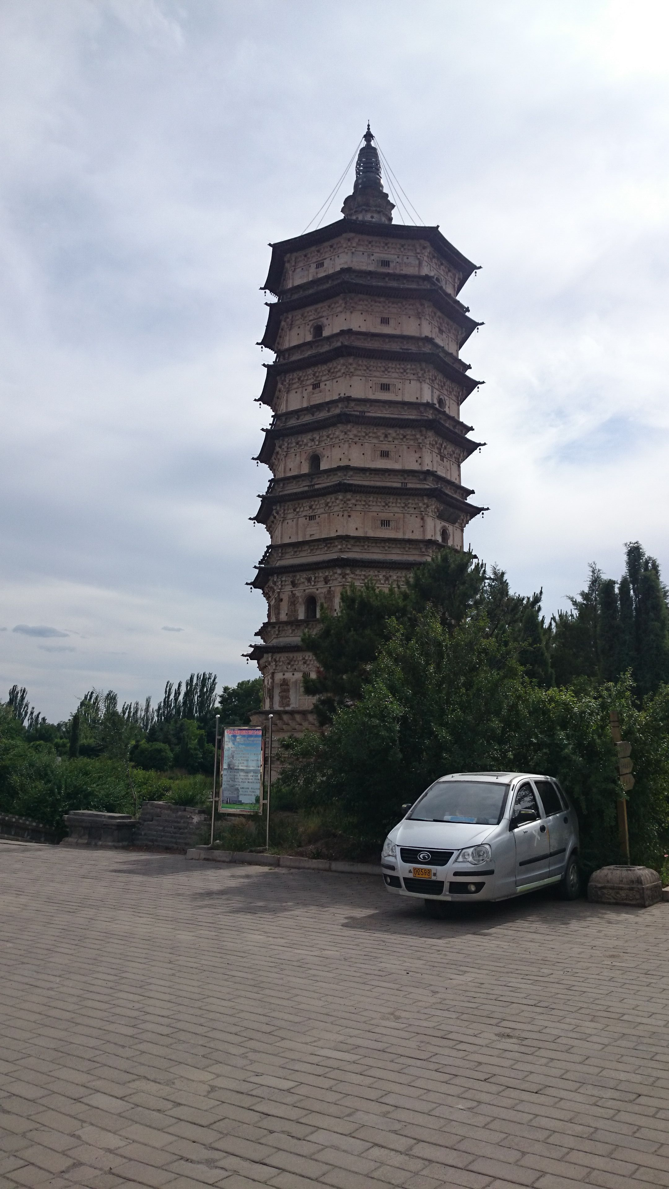 呼和浩特市万部华严经塔